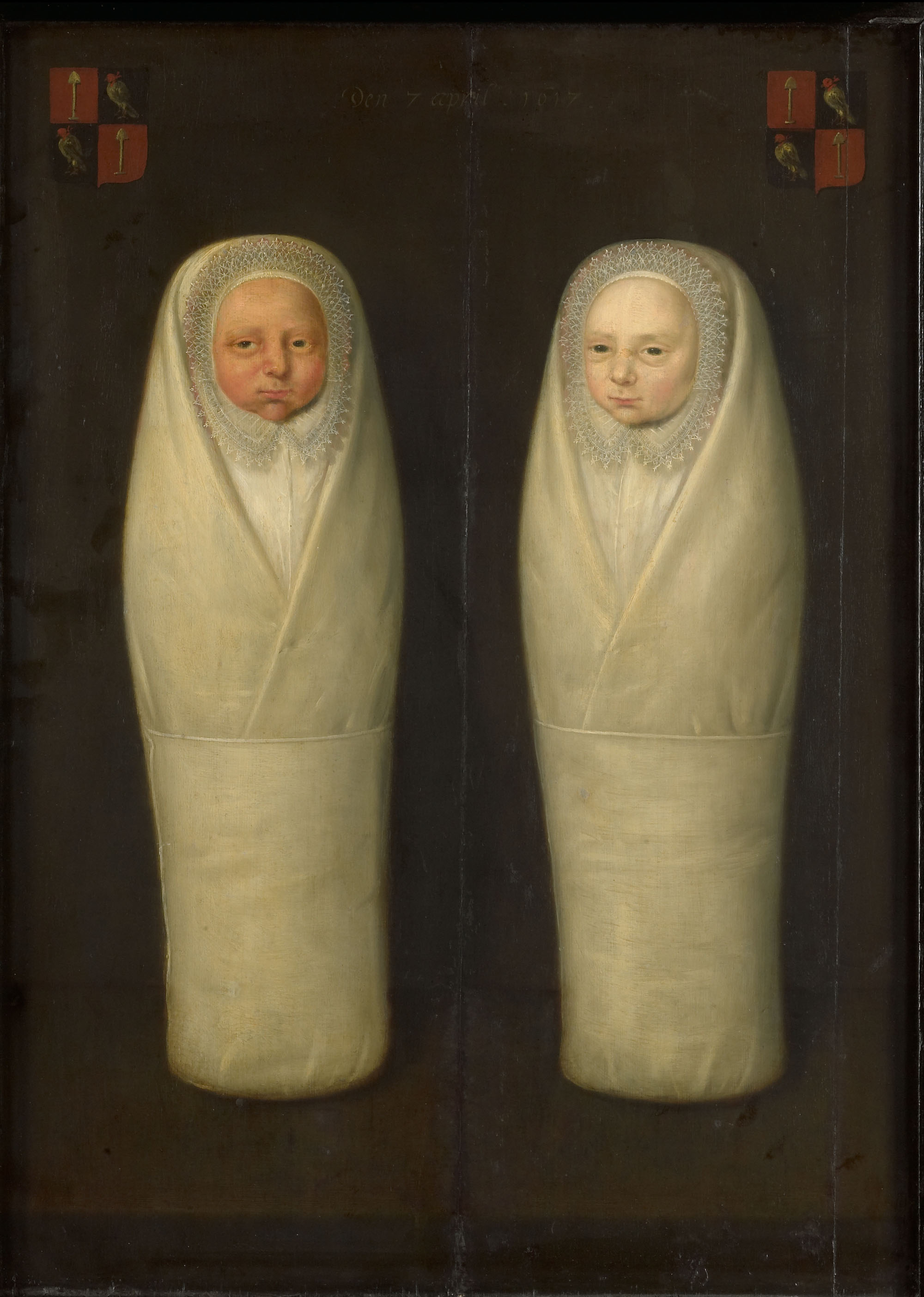 Een ingebakerde tweeling: vroeg gestorven kinderen van Jacob Dircksz de Graeff en Aeltge Boelens Loen